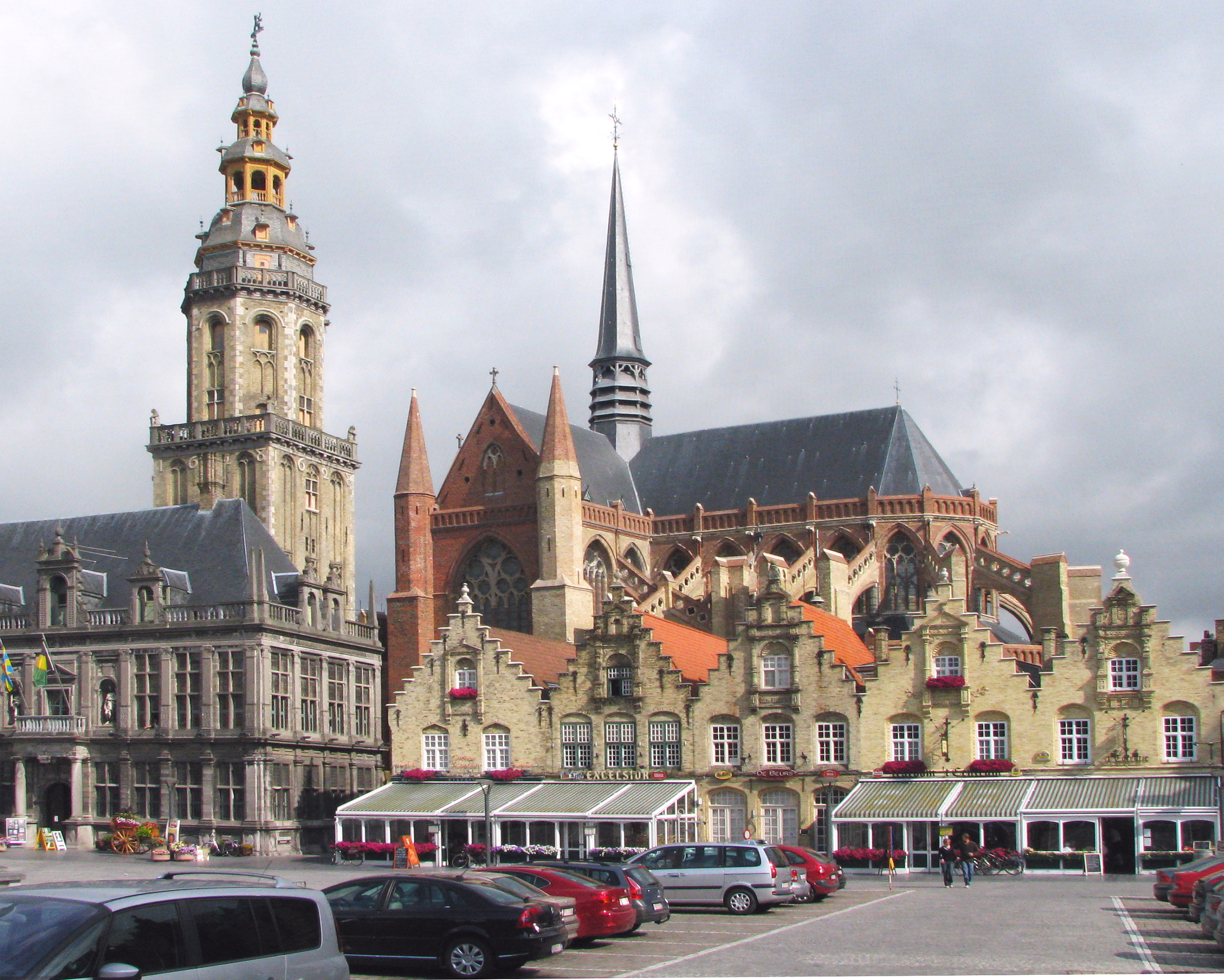 Der Grote Markt mit den Treppengiebelhäusern und dem Rathaus Stadhuis met Befried achteraan Sint-Walburgakerk in Veurne Belgien Foto Wolfgang Pehlemann IMG_1377